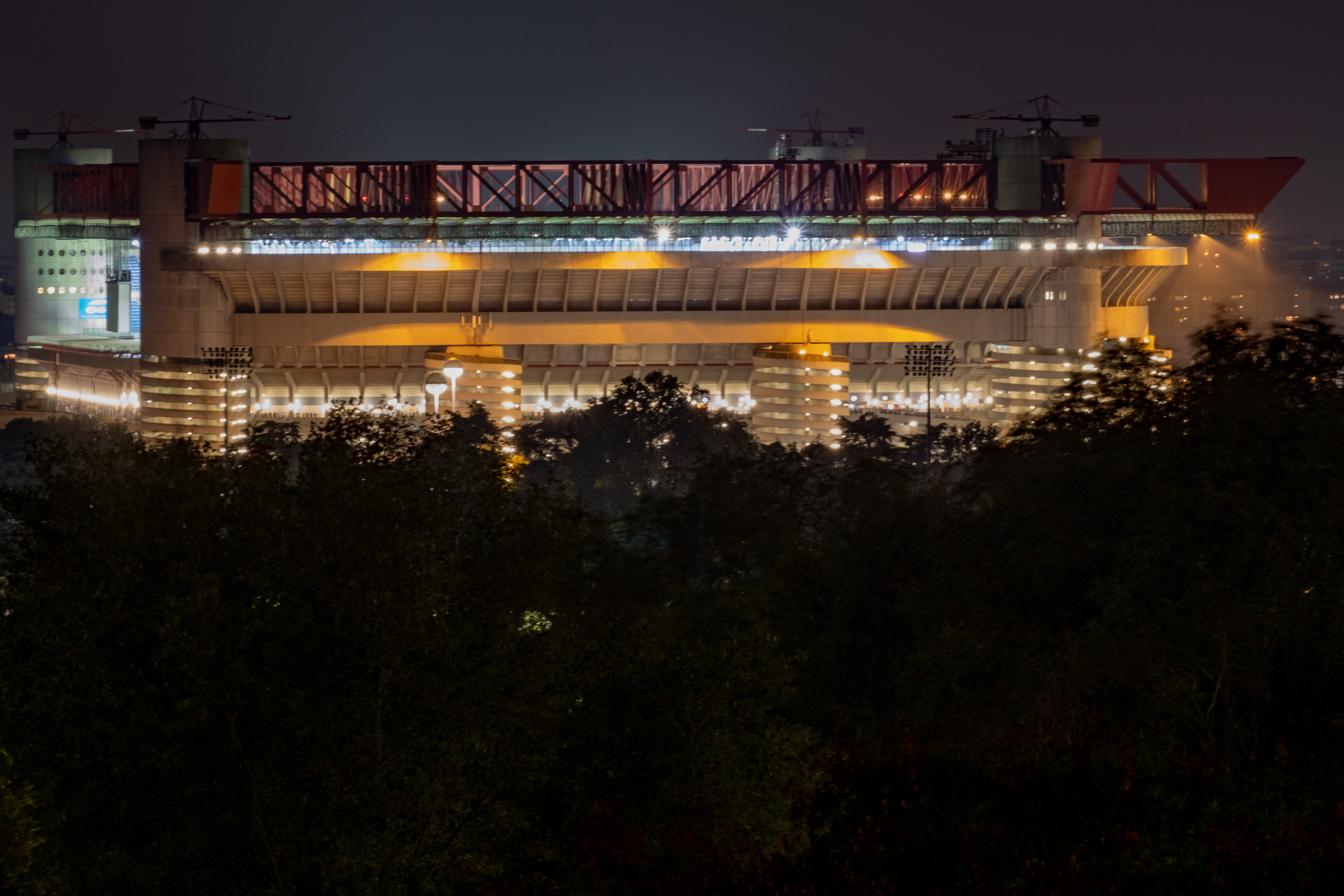 Stadio San Siro This is a photo of a monument which is part of cultural heritage of Italy.